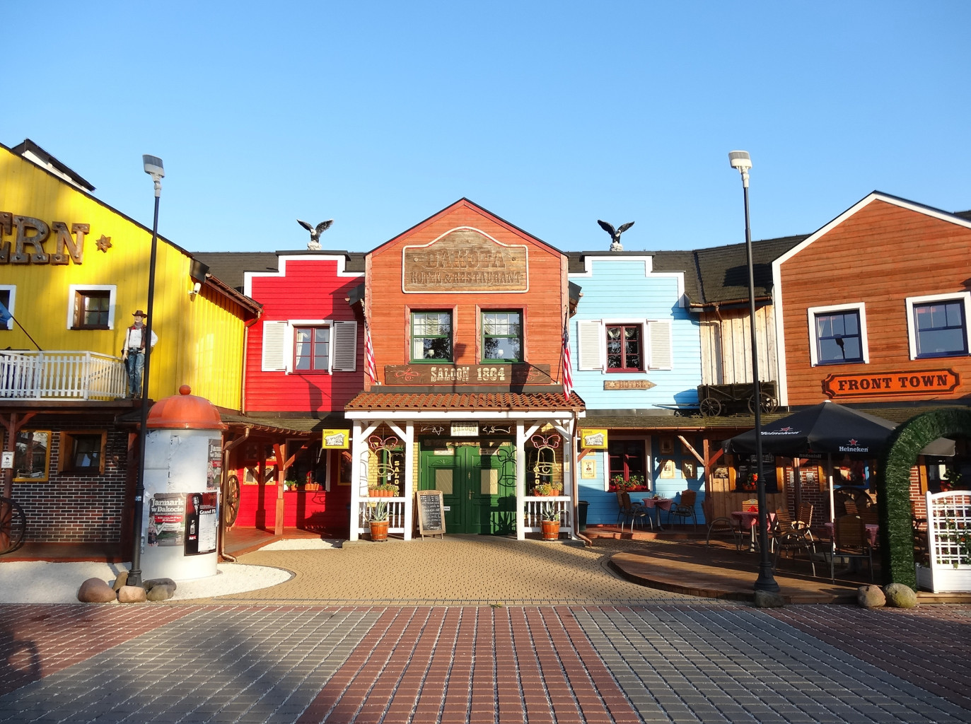 Hotel Dakota w Niwach, gmina Osielsko, powiat bydgoski